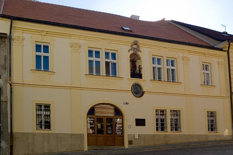 Tylův dům